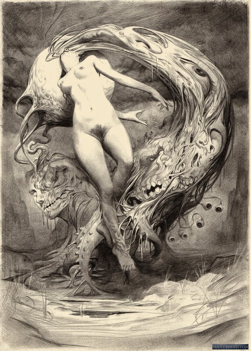 Ohne Titel